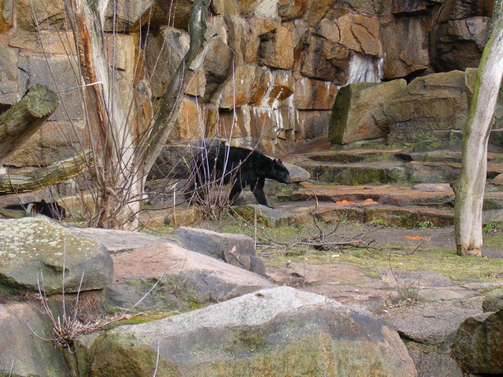 Tierpark Berlin - Schwarzbär Baribal im Bärenschaufenster